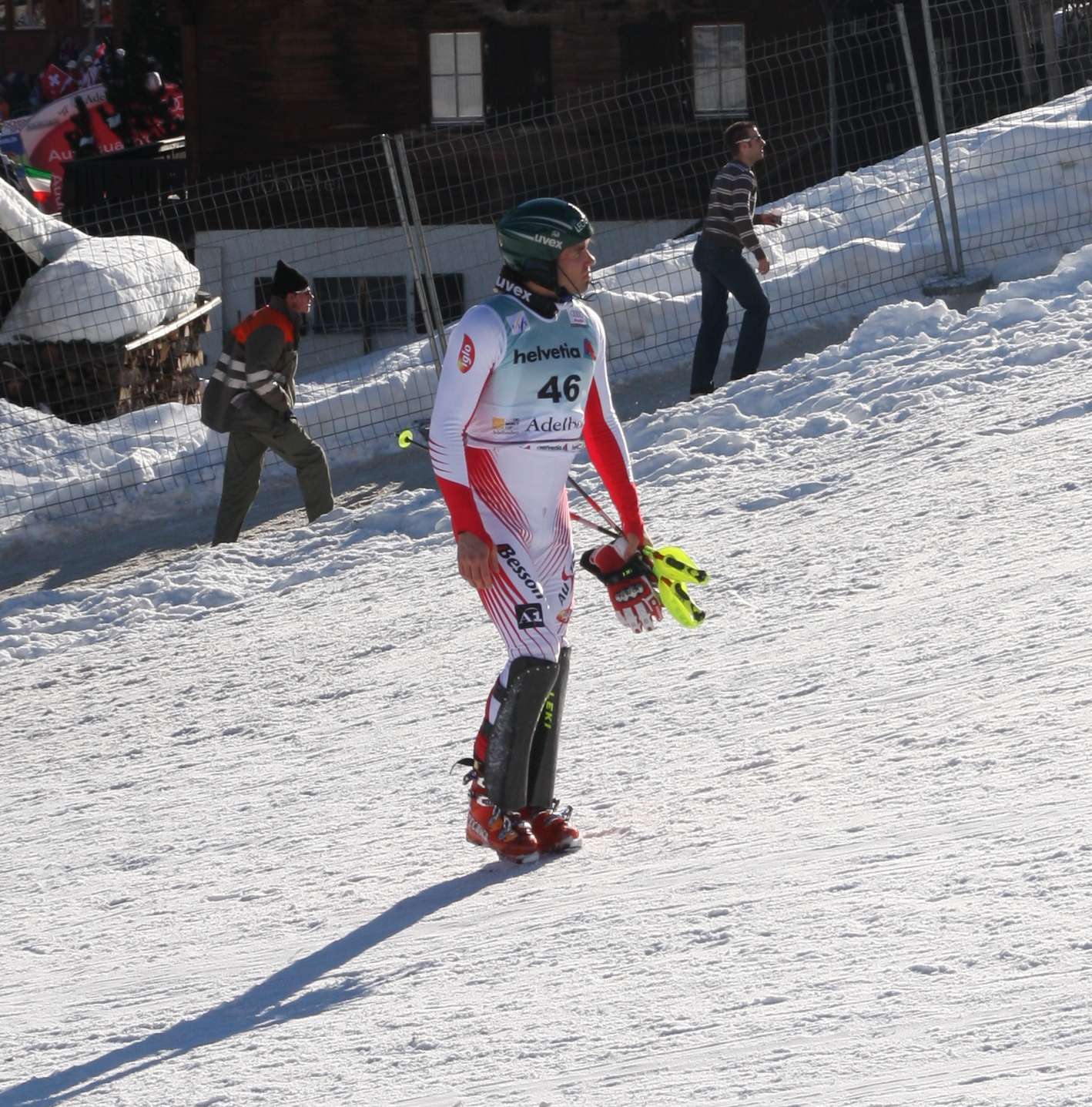 Wolfgang Hörl nach seinem Ausfall im Slalom von Adelboden 2009